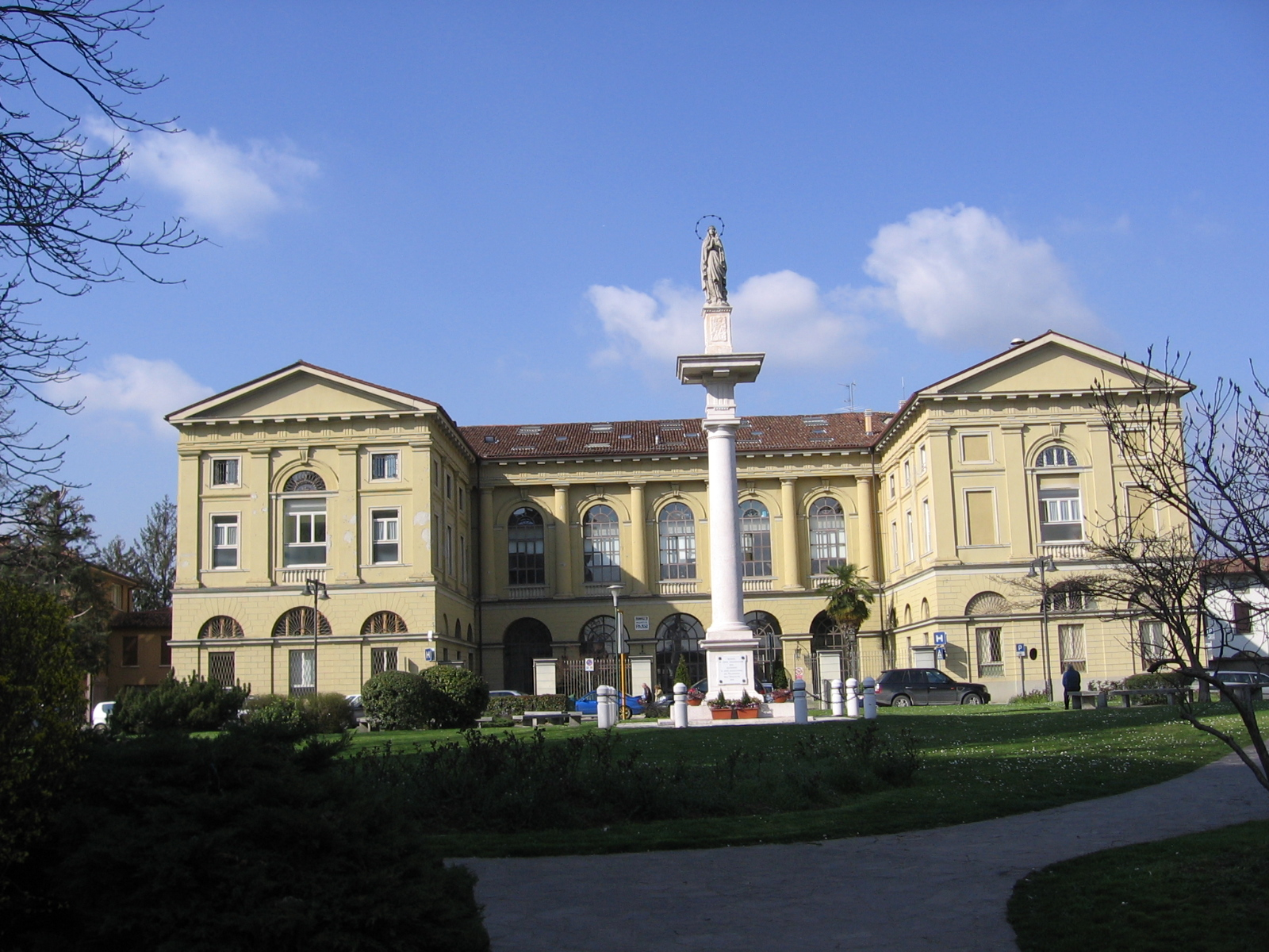 Calcinate, Bergamo, Italia